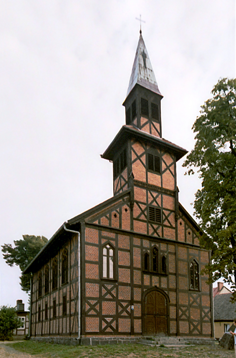 Ujście, kościół ewangelicki, Stary Rynek, 1850-52